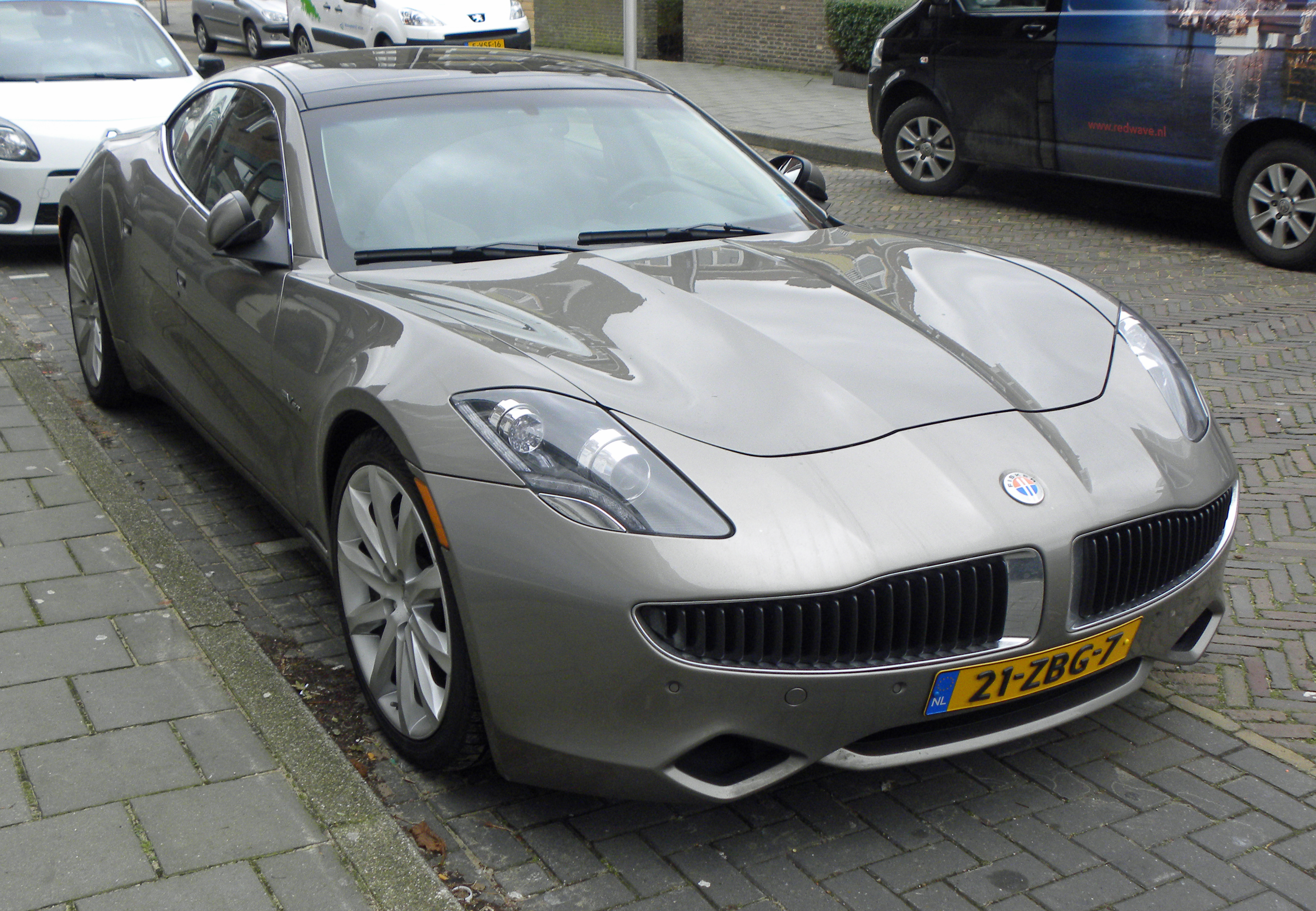 2012 Fisker K 1 Karma